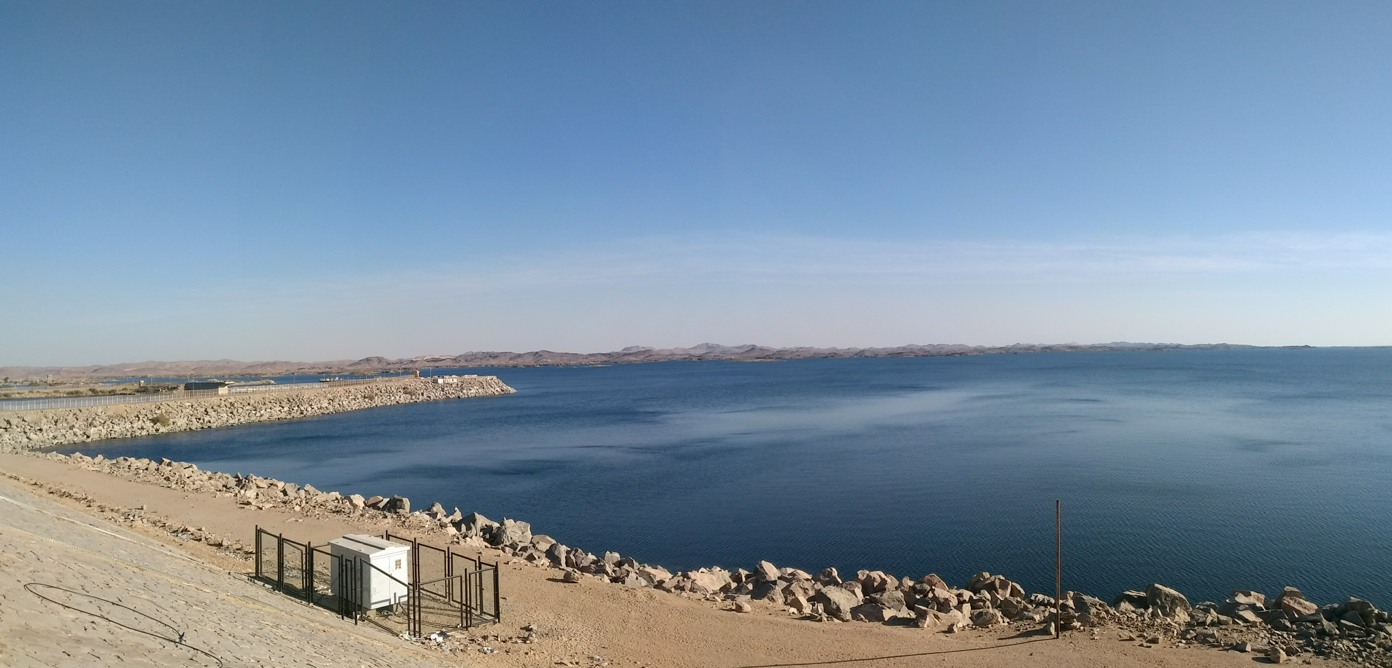 صورة لبحيرة التخزين الخاصة بالسد